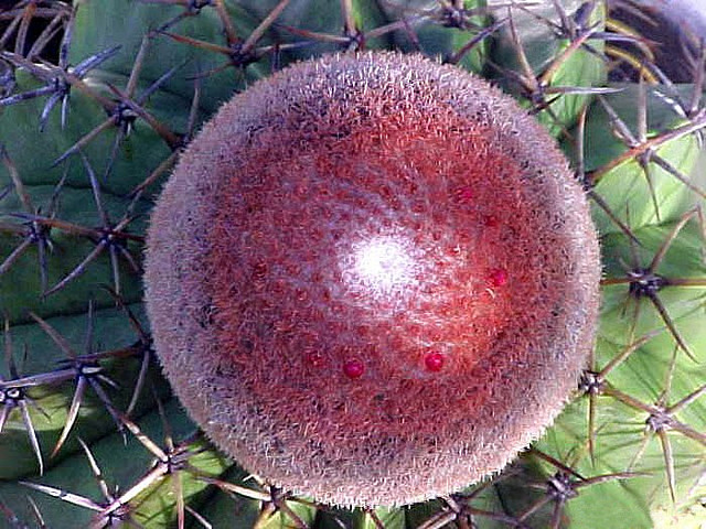 Melocactus-zehntneri...Cacto Coroa de frade